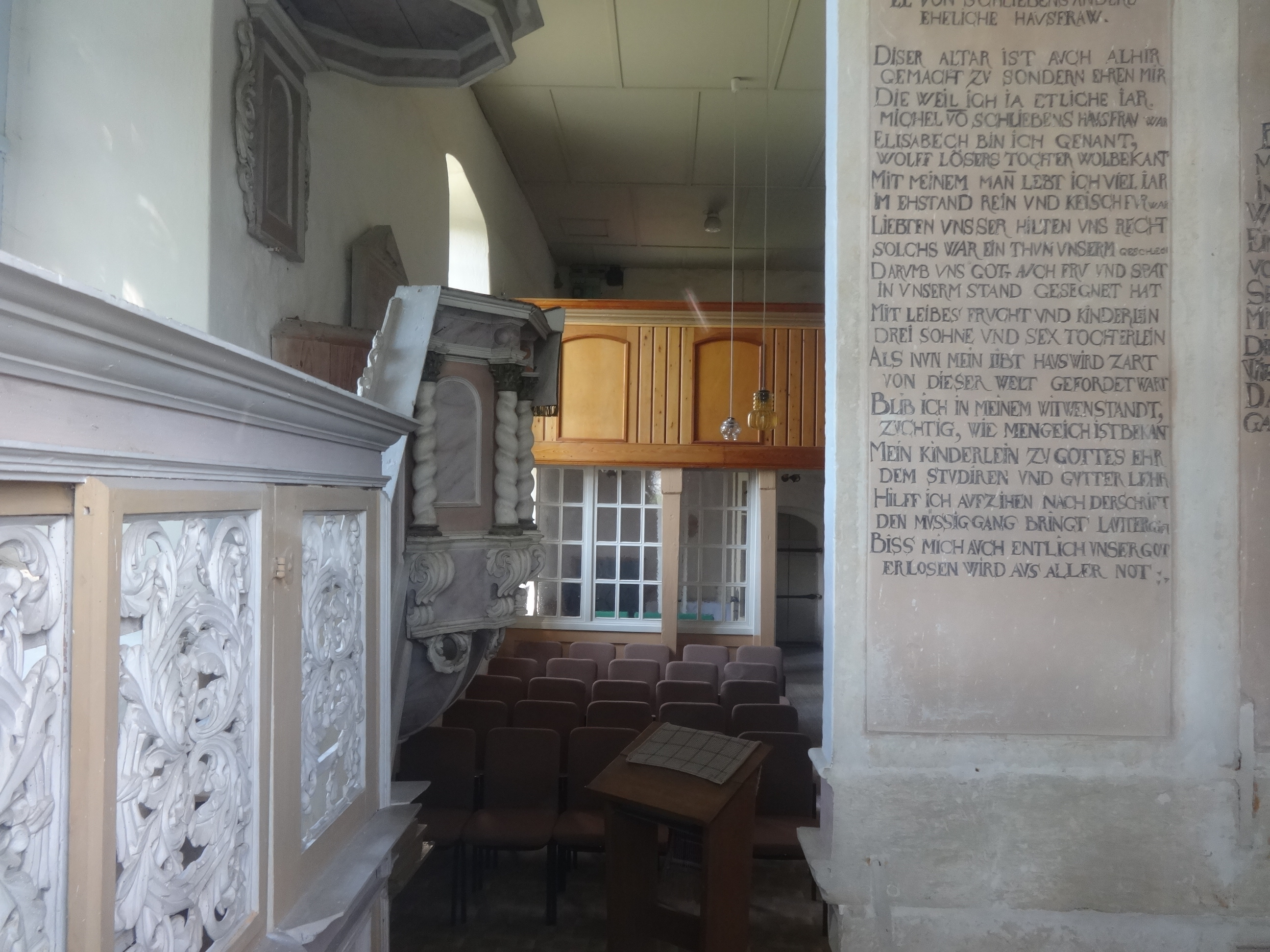 Die Dorfkirche in Görsdorf ist eine Feldsteinkirche, die vermutlich im 14. Jahrhundert erbaut und im 18. Jahrhundert barock umgebaut wurde. 1977 wurden der Kirchturm sowie eine Patronatsloge abgerissen. Im Innern befindet sich ein qualitätsvolles Altarretabel aus Sandstein, das gleichzeitig als Epitaph derer von Schlieben dient.